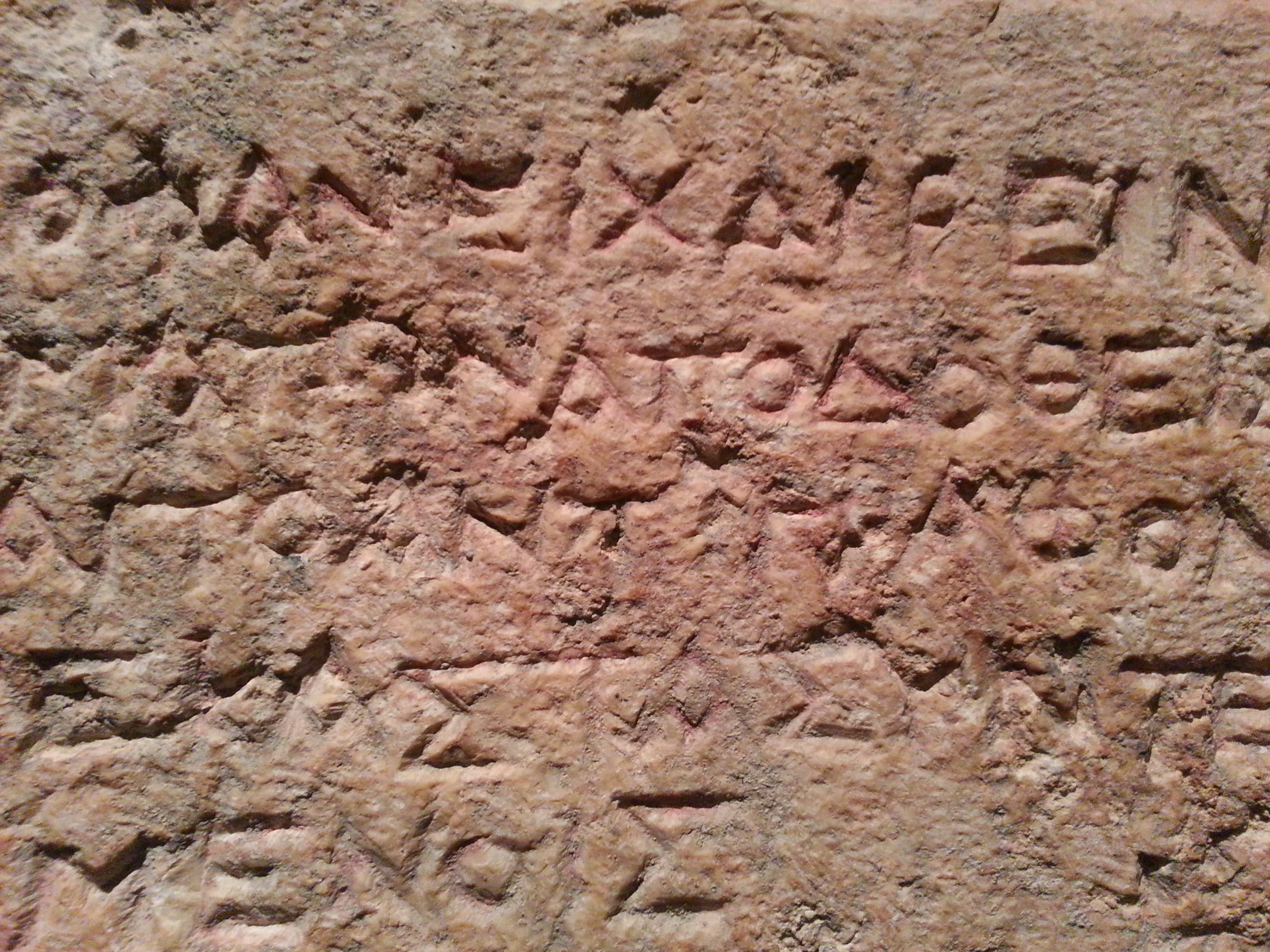 כתובת הליודורוס במוזיאון ישראל בירושלים